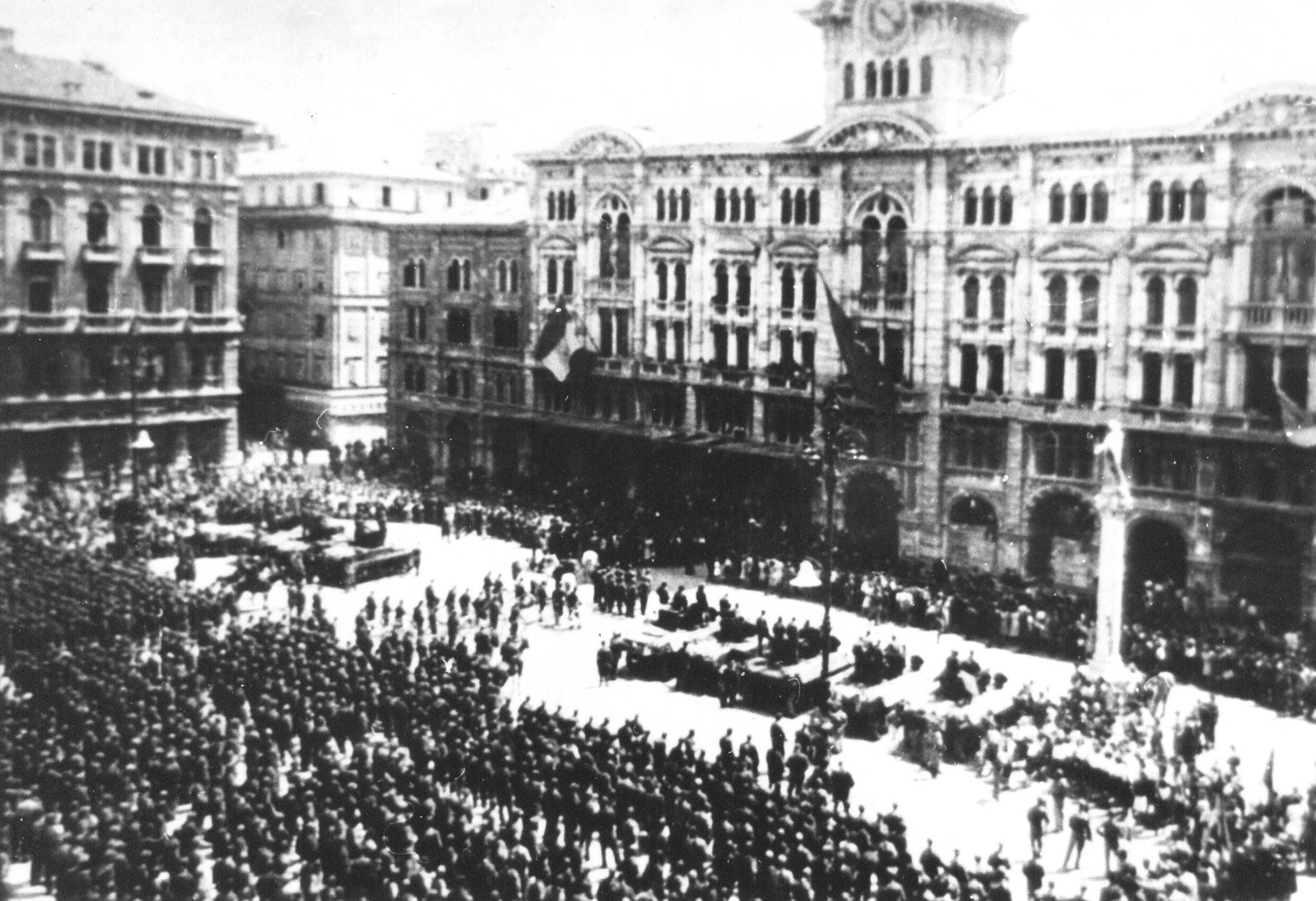 Smotra jedinica NOVJ koje su oslobodile Trst, maja 1945.